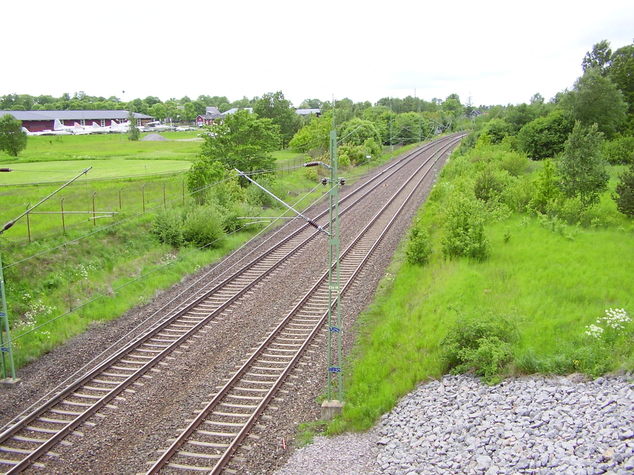 Södra (Östra) stambanan vid Malmslätt. I bakgrunden syns ortens flygvapenmuseum. Foto taget av Lavas 2005.